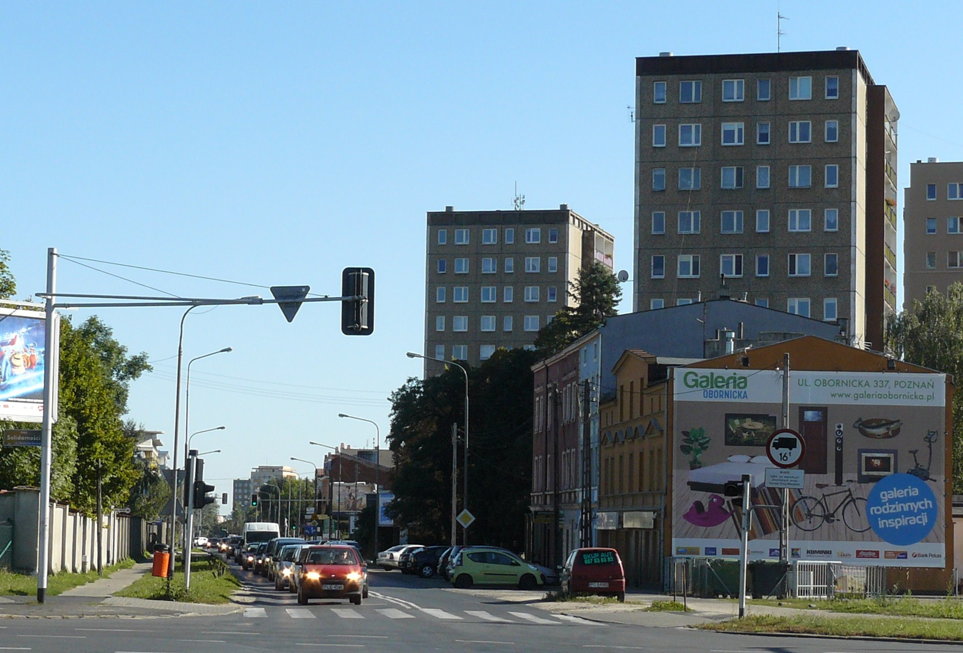 Poznań, ul. Piątkowska w rejonie Winiar.